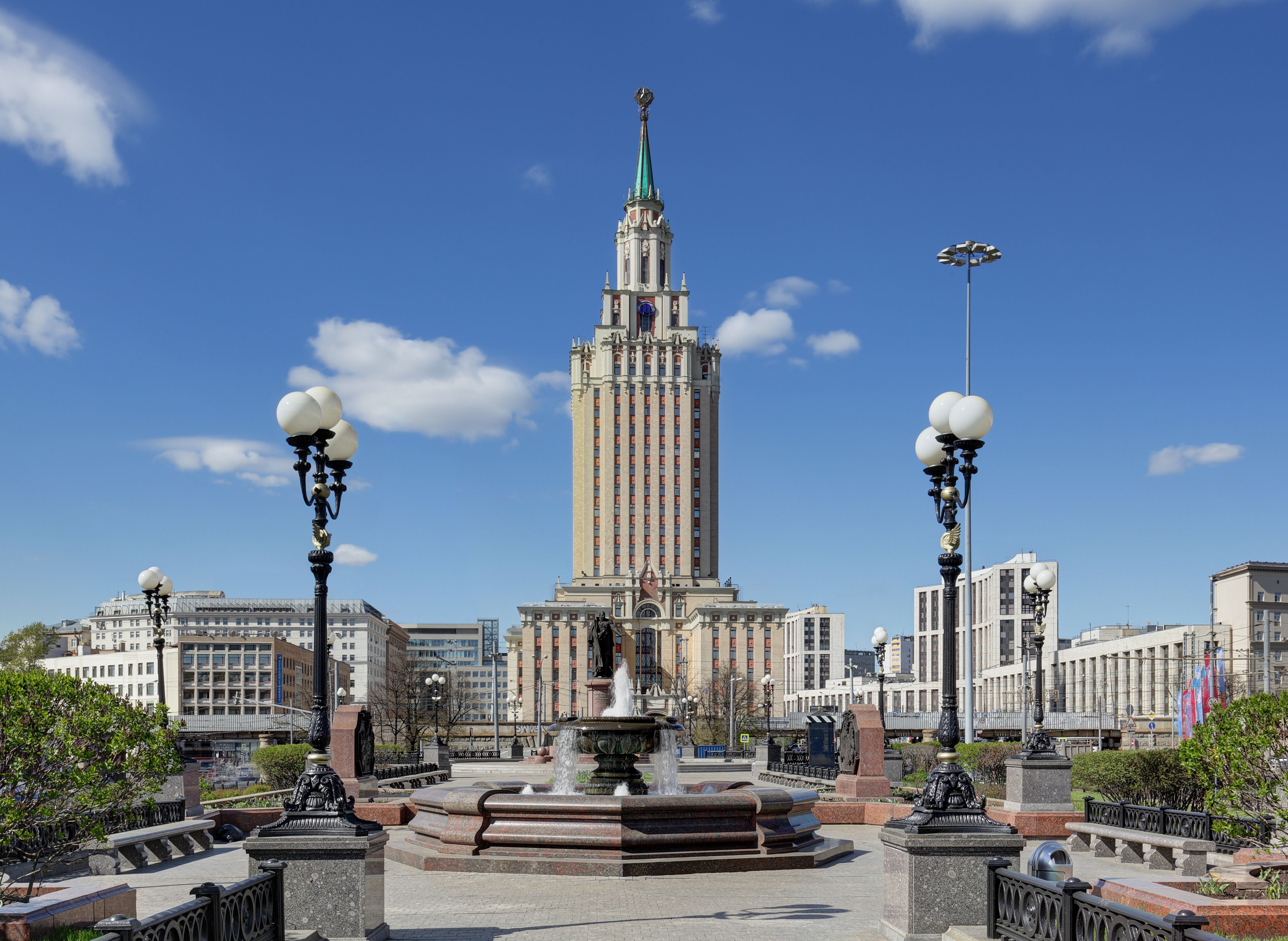 Фасад гостиницы Hilton Moscow Leningradskaya